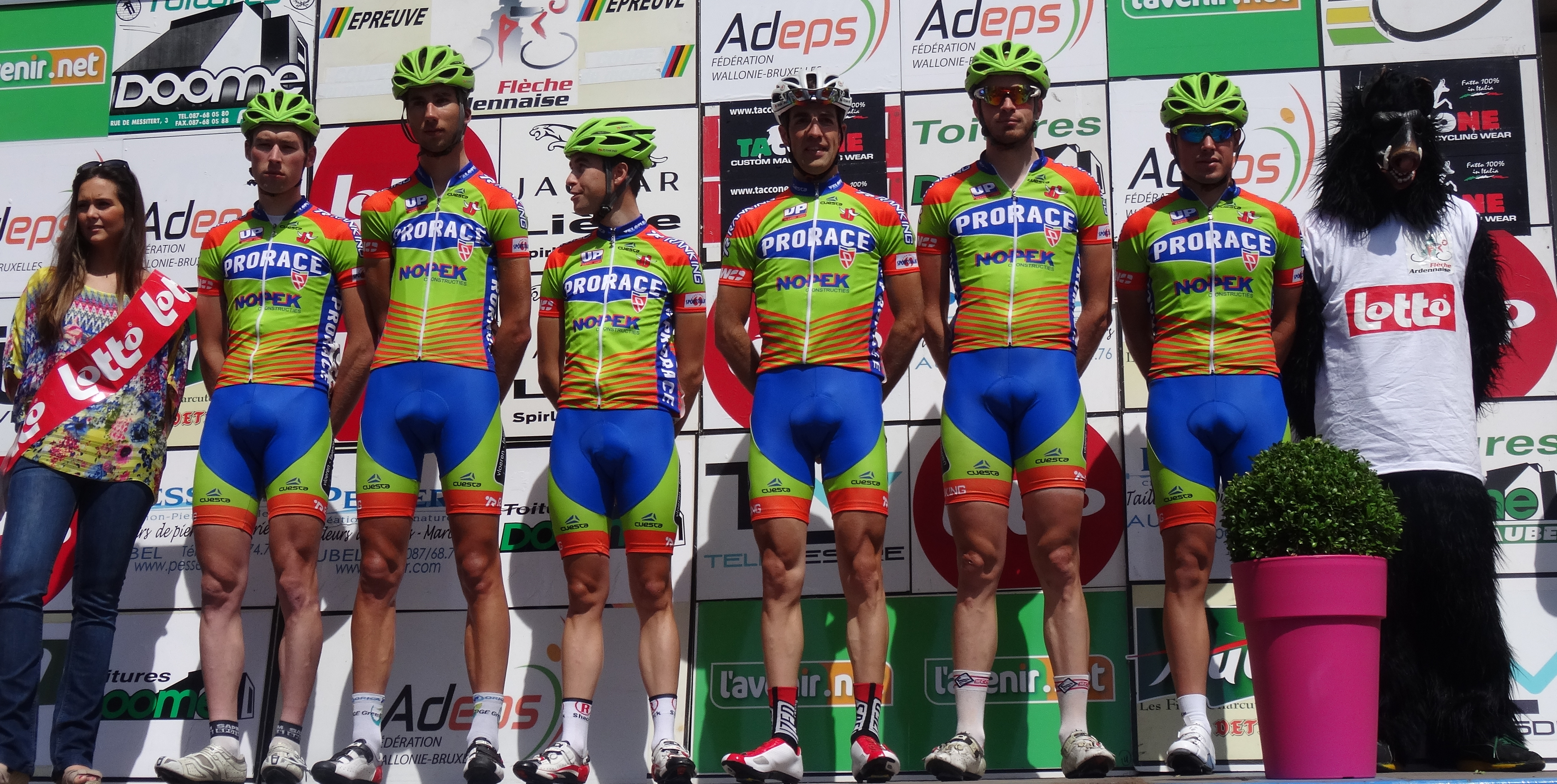 Reportage photographique réalisé le dimanche 22 juin à l'occasion du départ et de l'arrivée de la Flèche ardennaise 2014 à Herve, Belgique.